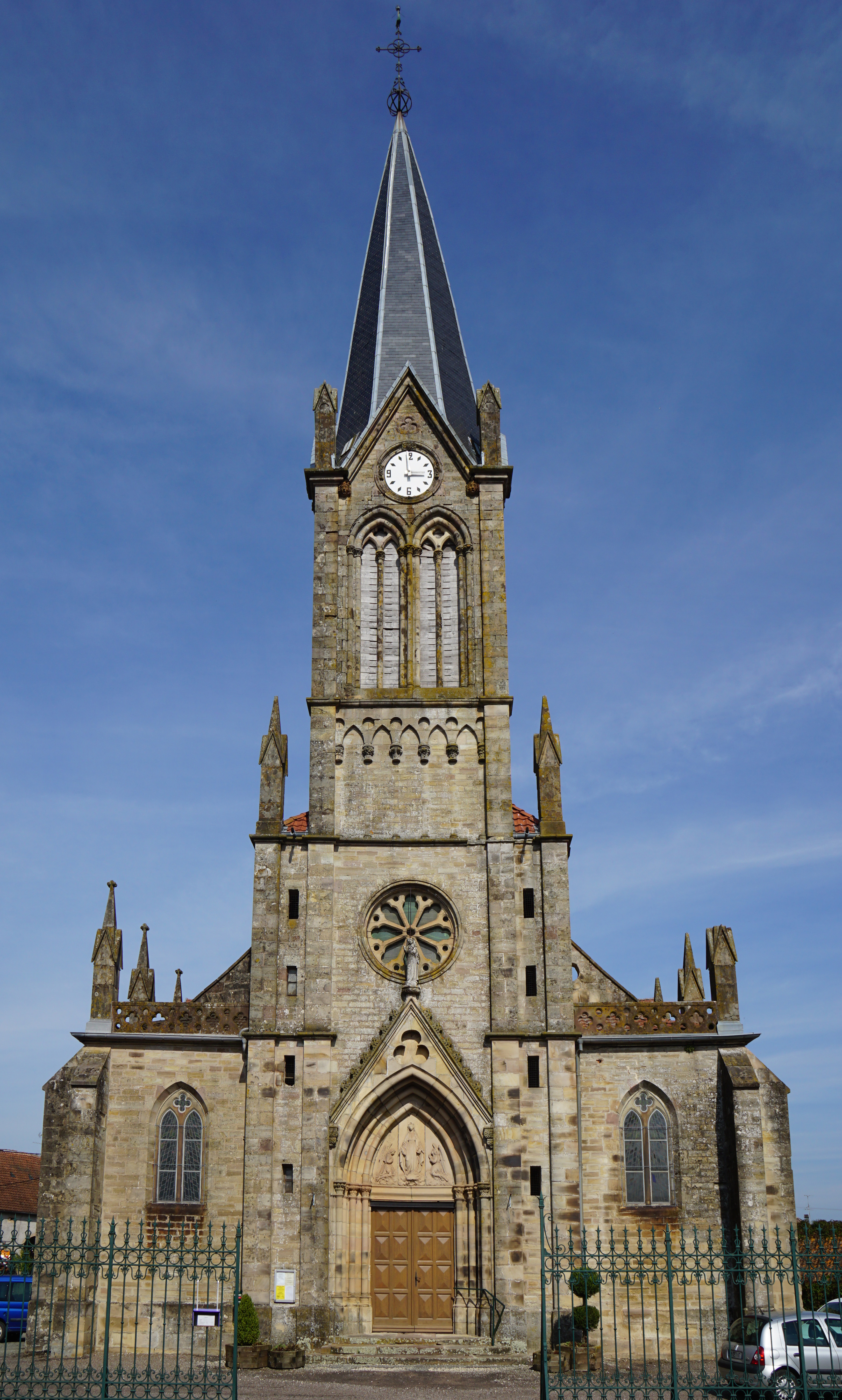 Église Saint-Valbert de Frahier-et-Chatebier.